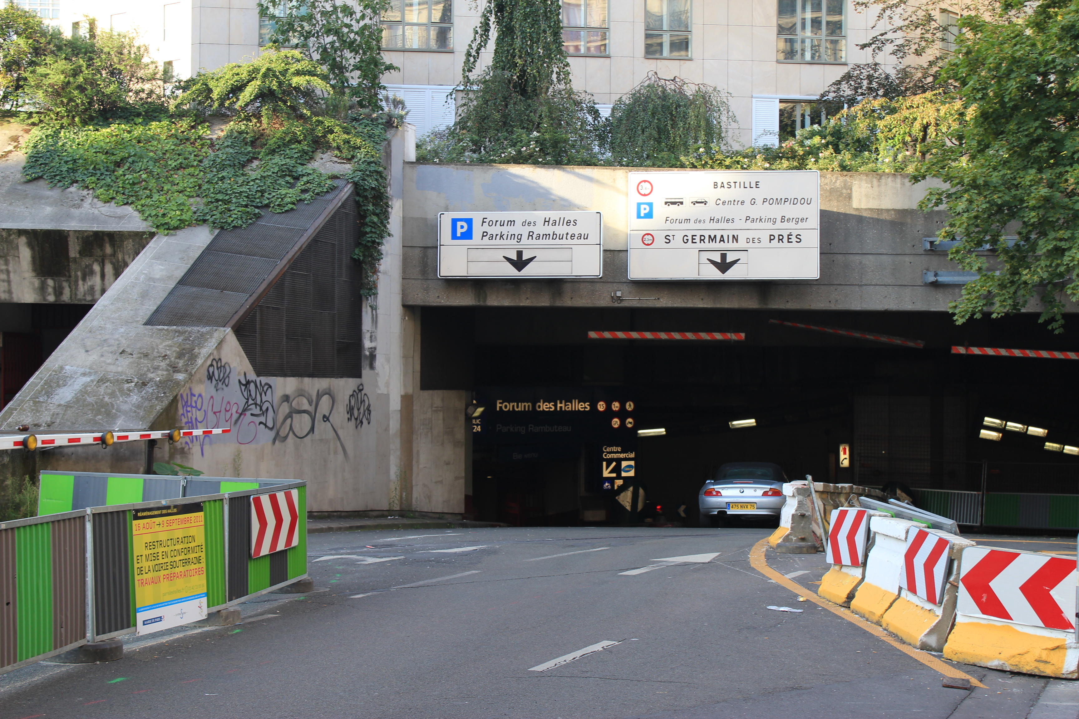 Trémie d'entrée du Tunnel des Halles à Paris